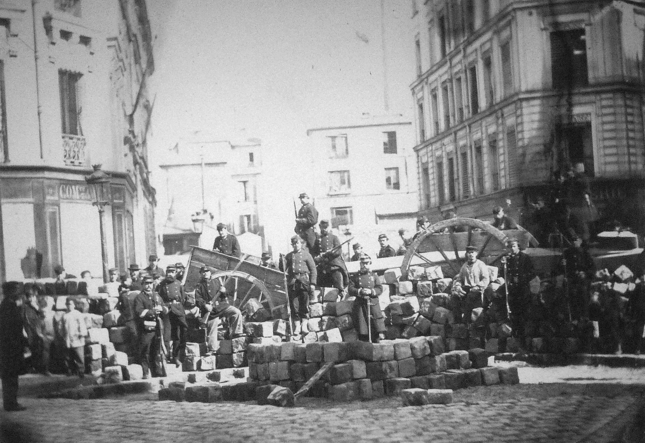 Exposition La Commune de Paris à l'Hôtel de Ville de Paris (18 mars - 28 mai 2011) - Barricade au Passage Raoul aujourd'hui rue Bréguet (coté Richard-Lenoir) - Musée Carnavalet